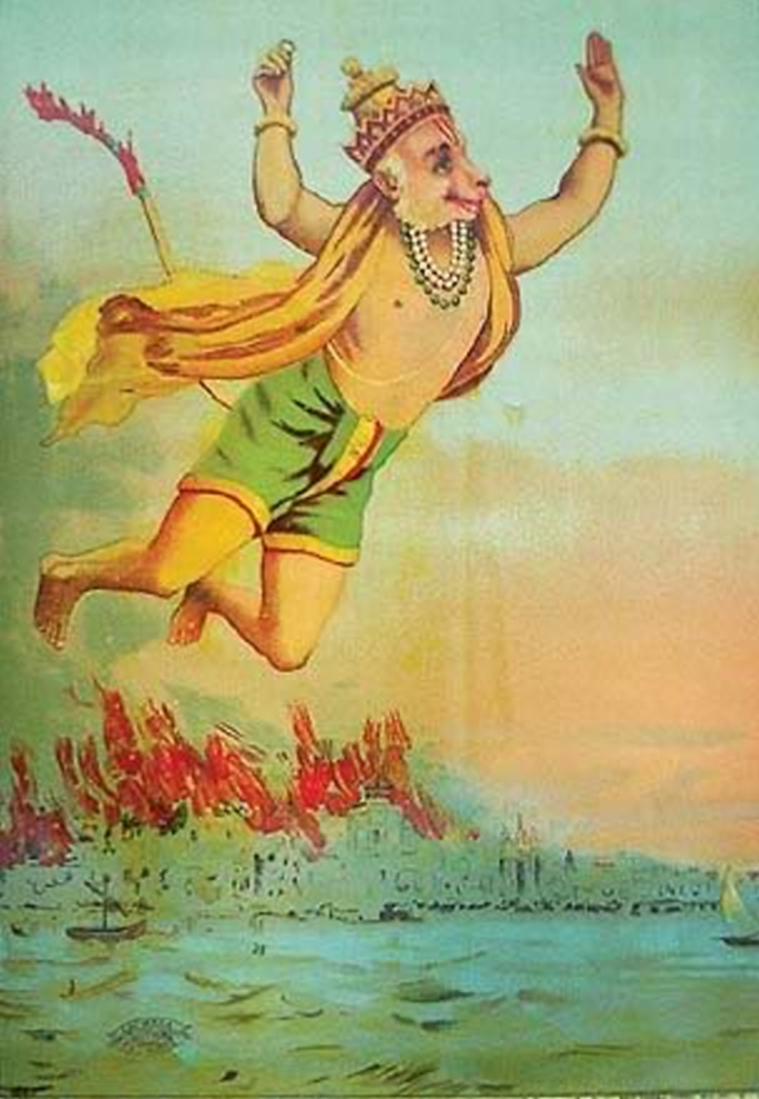 Lanka Dahan Hanuman